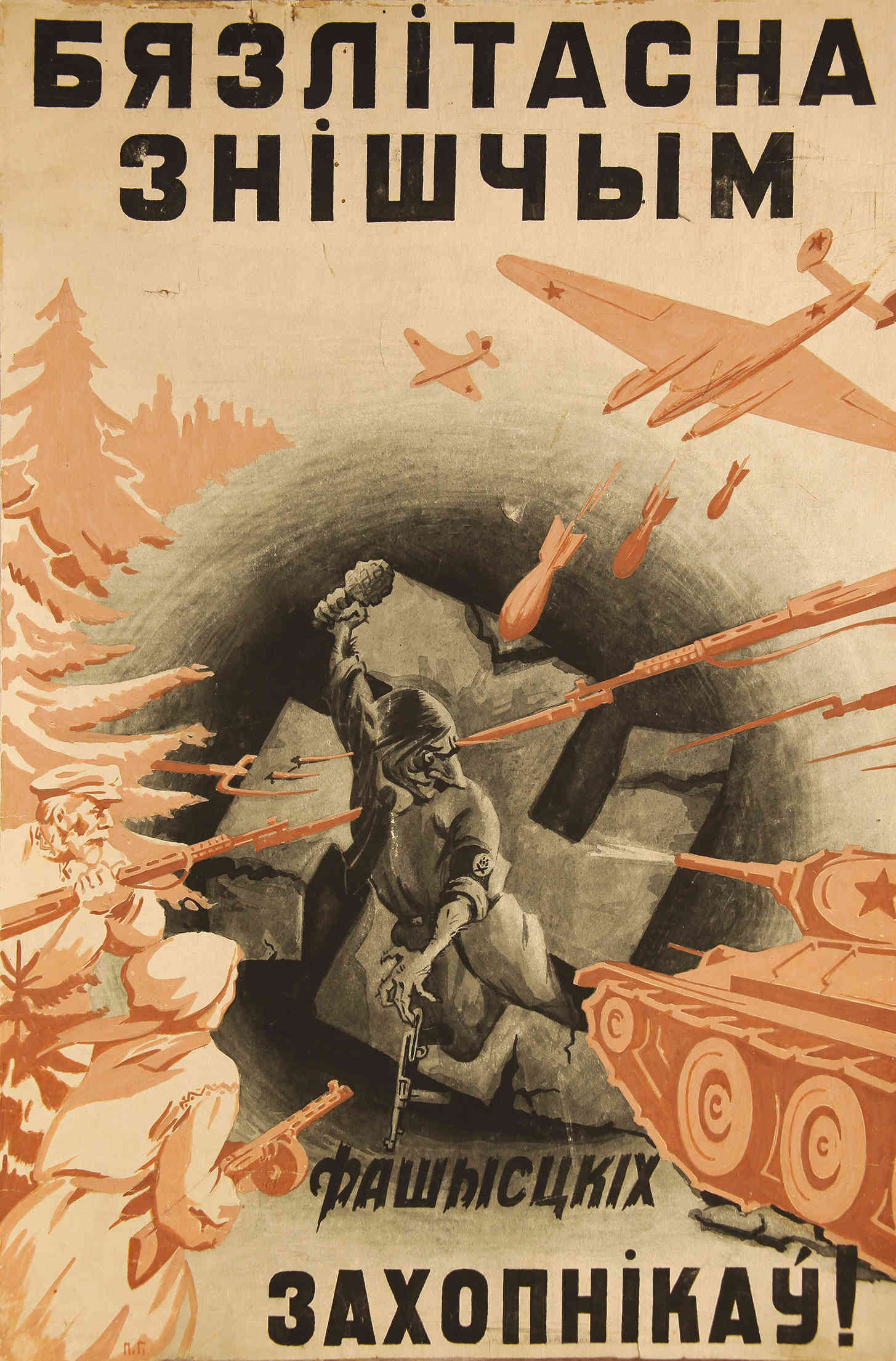 Бязлітасна знішчым захопнікаў! Гаўрыленка Павел, 1942 г. Папера, кардон, гуаш, туш, акварэль. 54×36 см. Беларускі дзяржаўны музей гісторыі Вялікай Айчыннай вайны